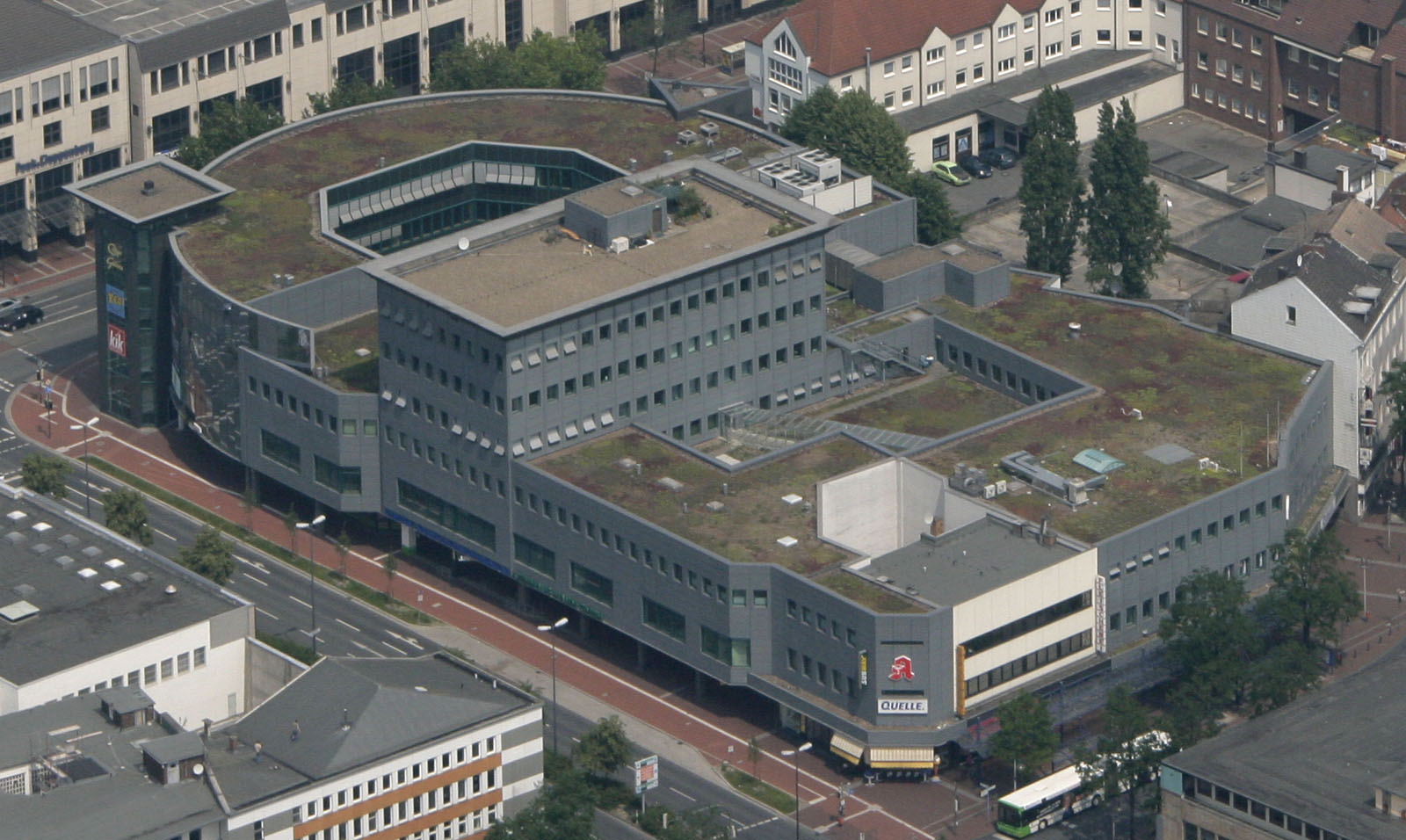 Luftbildaufnahme Hamm